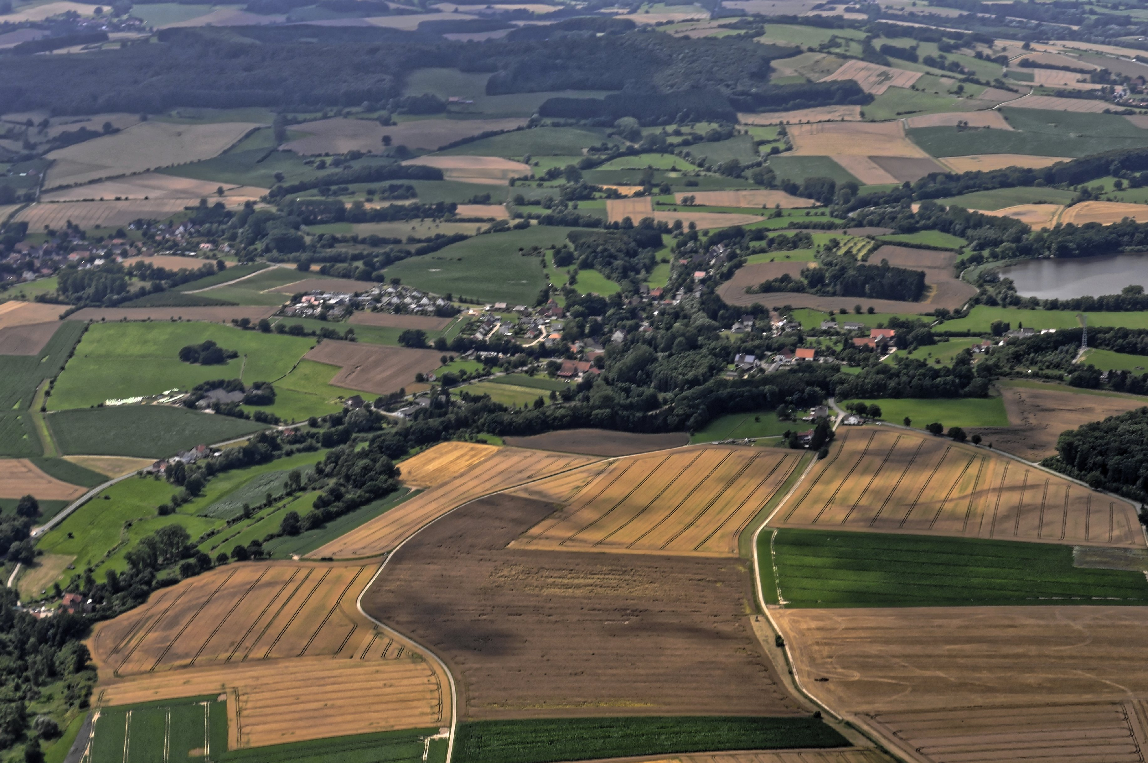 Bilder vom Flug Nordholz-Hammelburg 2015: Billerbeck